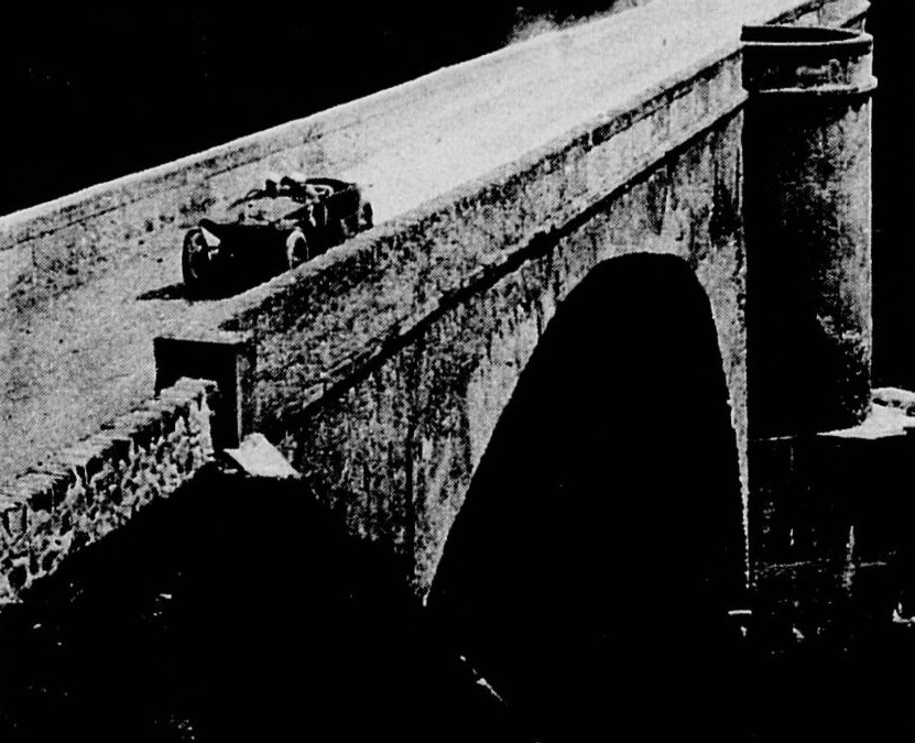 Albert Guyot, vainqueur du circuit de la Corse (ou grand prix tourisme de la Corse) en 1921 - Le Monde illustré du 30 avril 1921, p.334